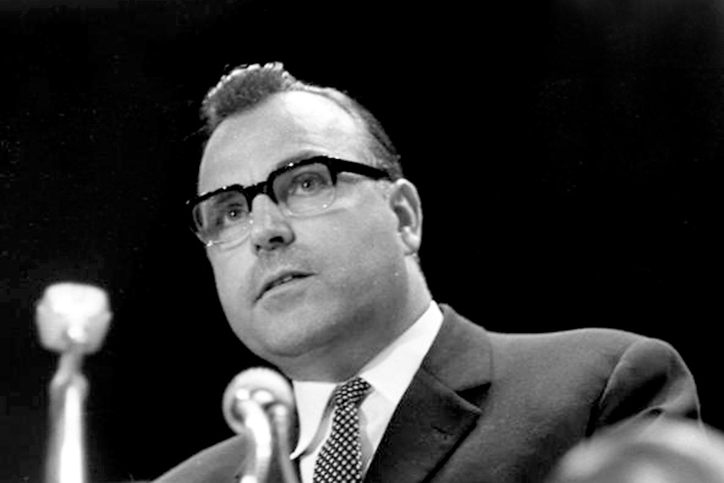 Bundeskanzler Kiesinger bei einer öffentlichen Kundgebung in der Friedrich-Ebert-Halle in Ludwigshafen (Helmut Kohl)